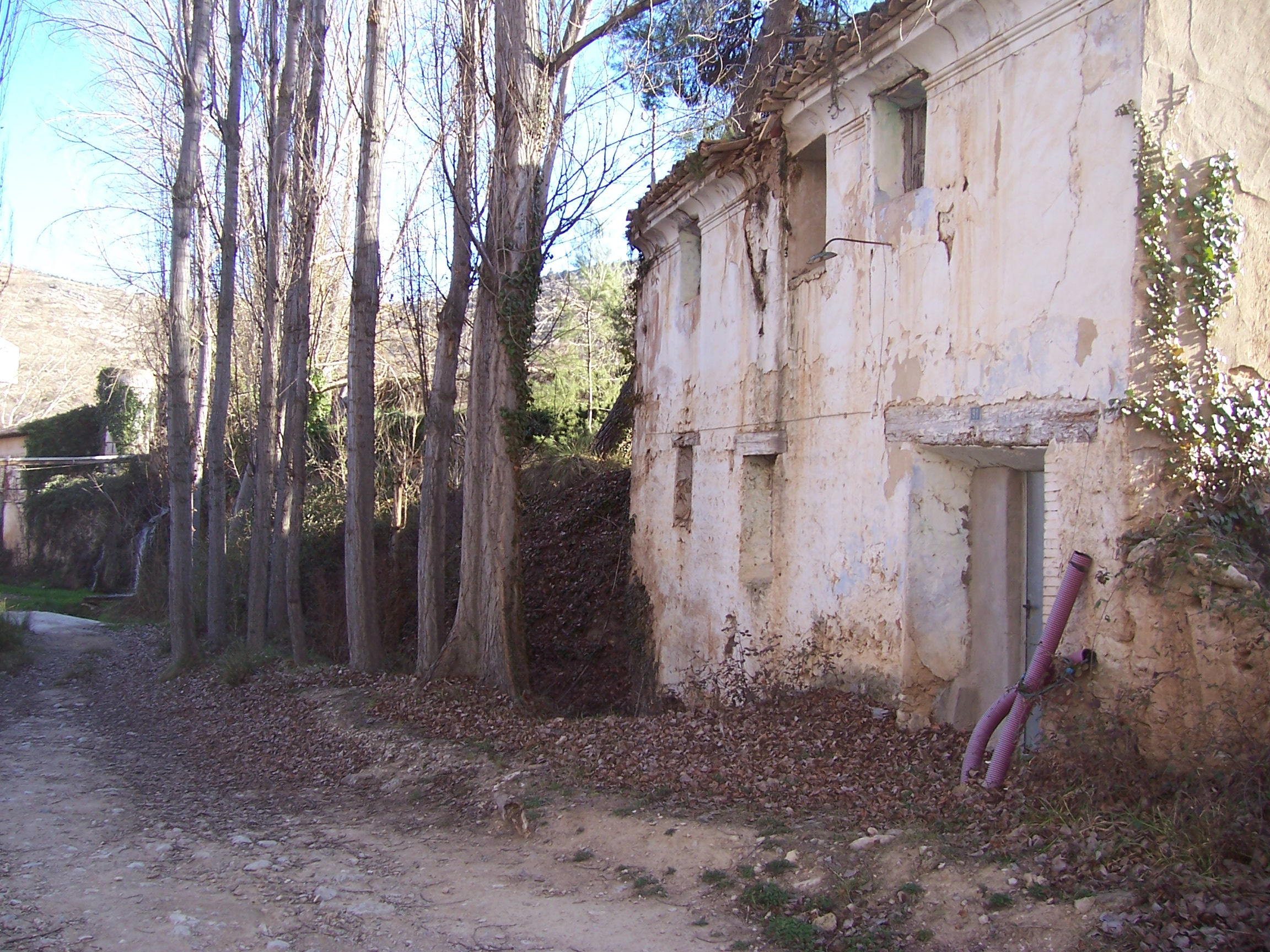 Vista general